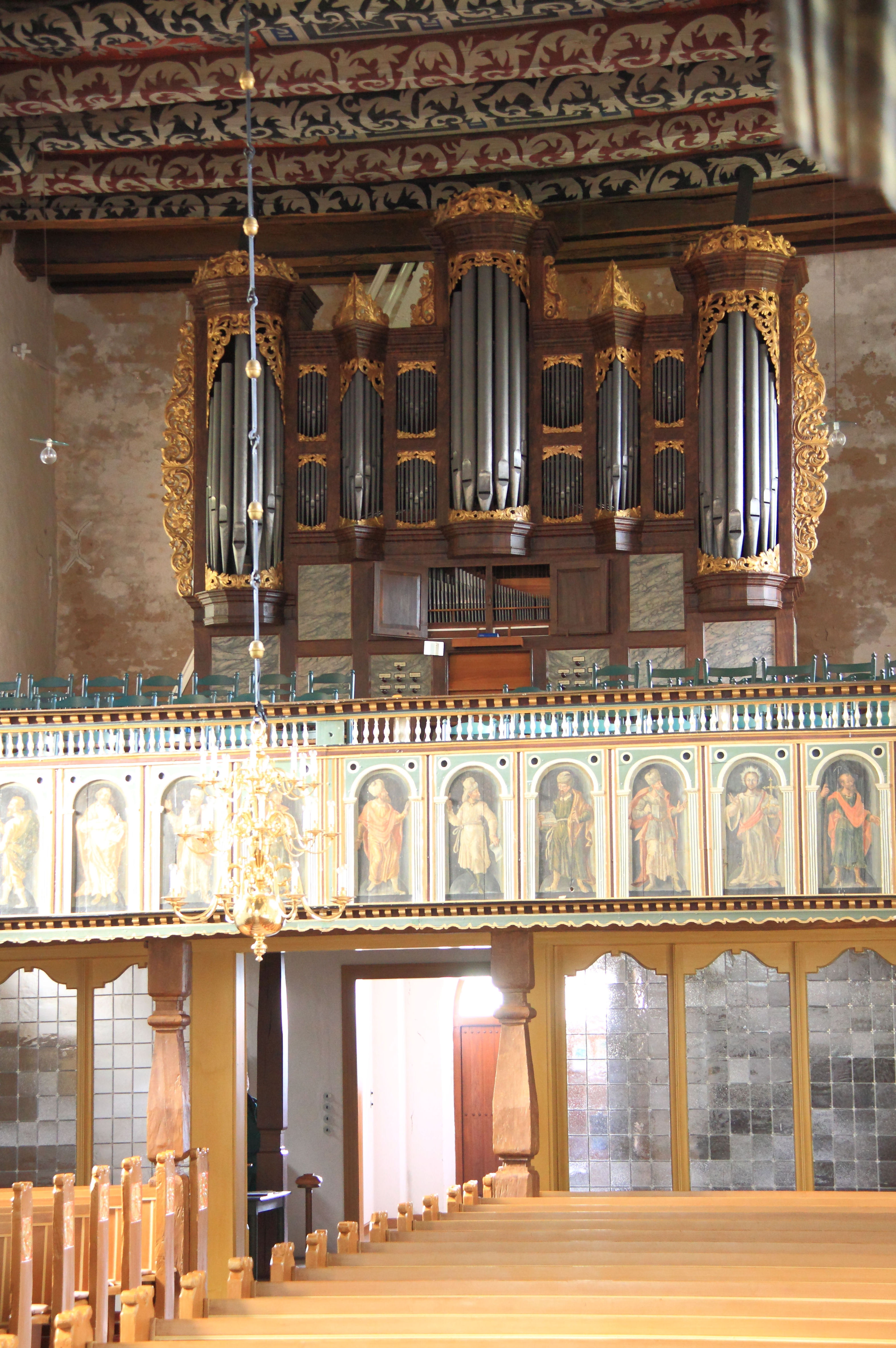 Orgel in Bockhorn, Landkreis Friesland, Niedersachsen